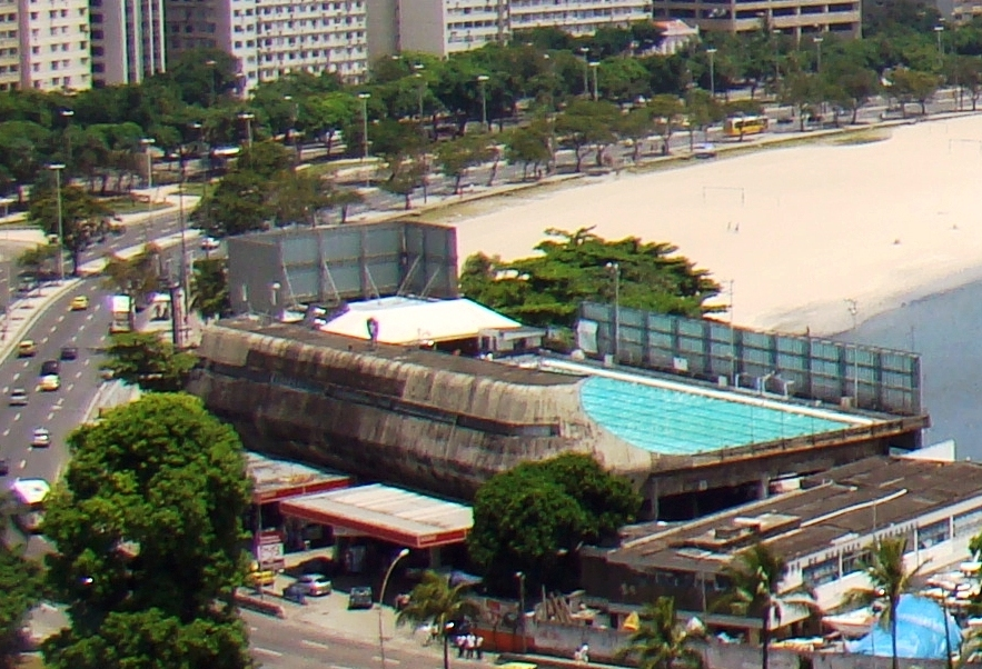 Redução de imagem. Mourisco Mar, sede de desportos aquáticos do Botafogo de Futebol e Regatas.